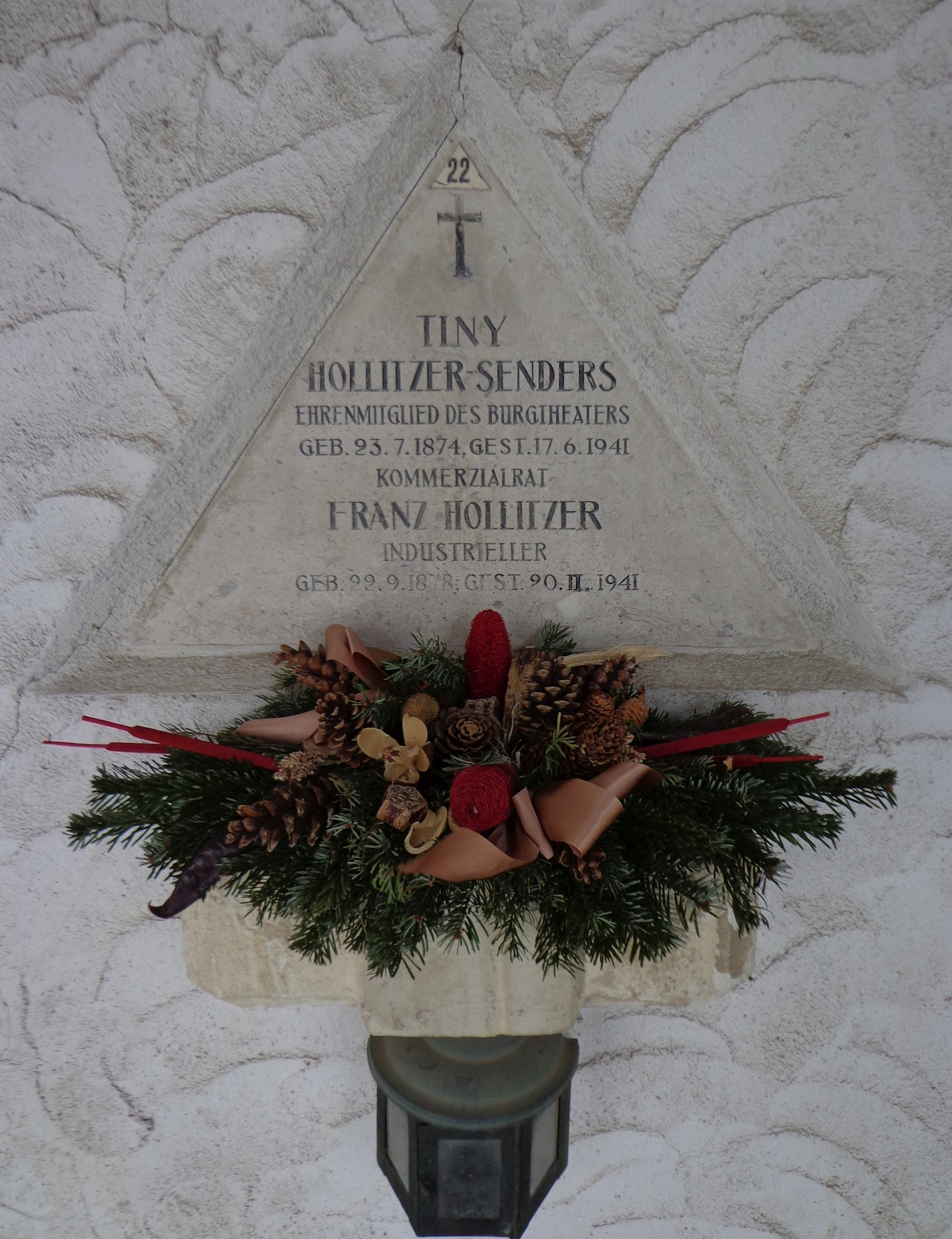 Feuerhalle Simmering - Arkadenhof (Abteilung ALI) - Urnengrab von Tiny Hollitzer-Senders